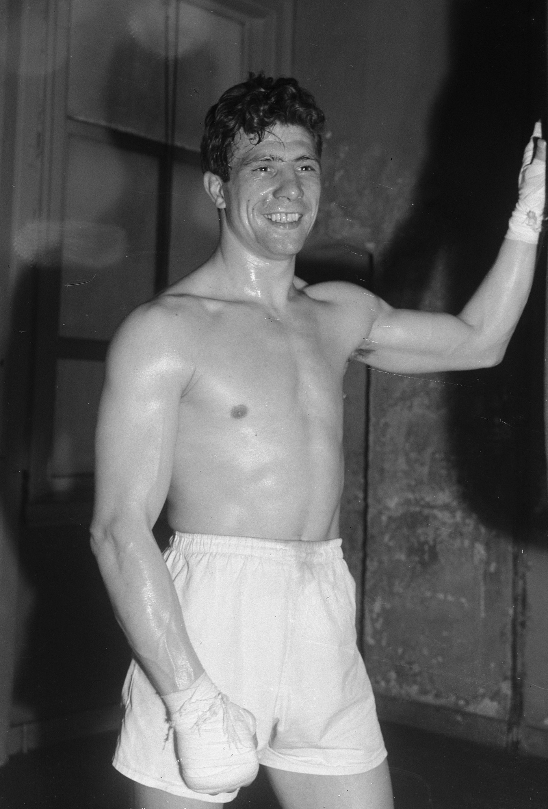 Training bokser Luc van Dam